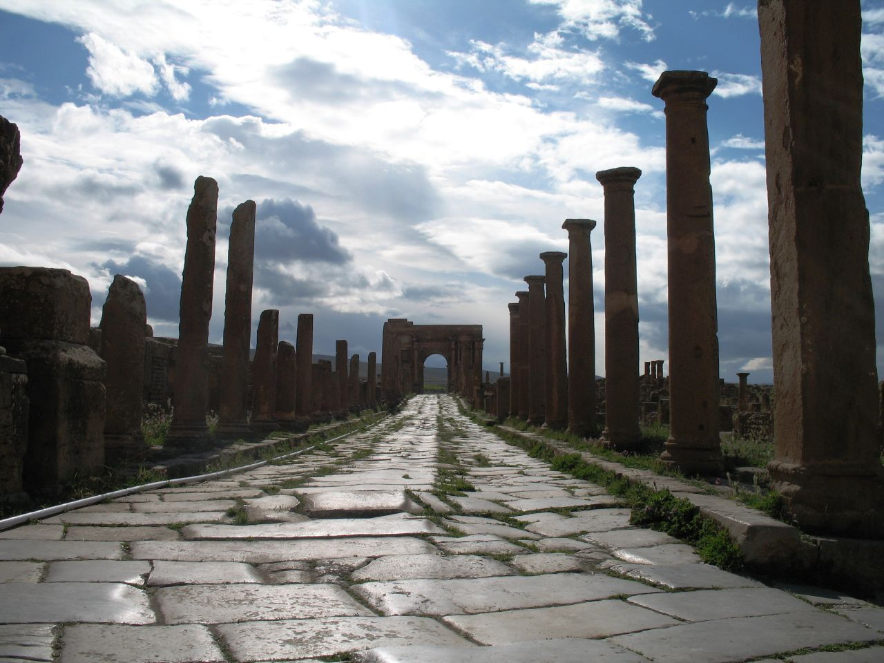 Ruines romaines de Timgad (Wilaya de Batna, Algérie). Rue menant à l'Arc de Trajan.